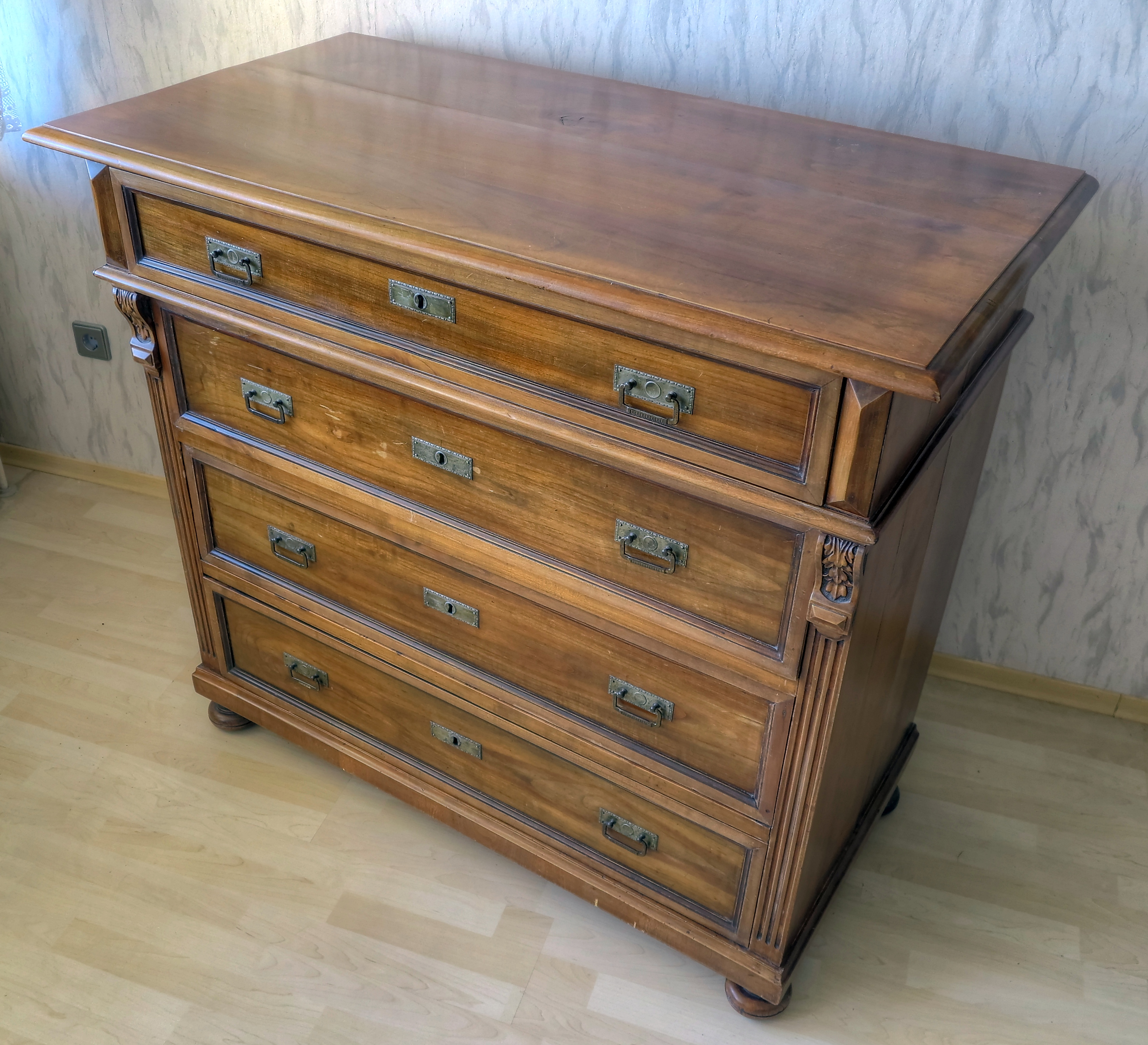 Gründerzeit-Kommode mit vier Schubladen, ca. 1880, Höhe ca. 120 cm